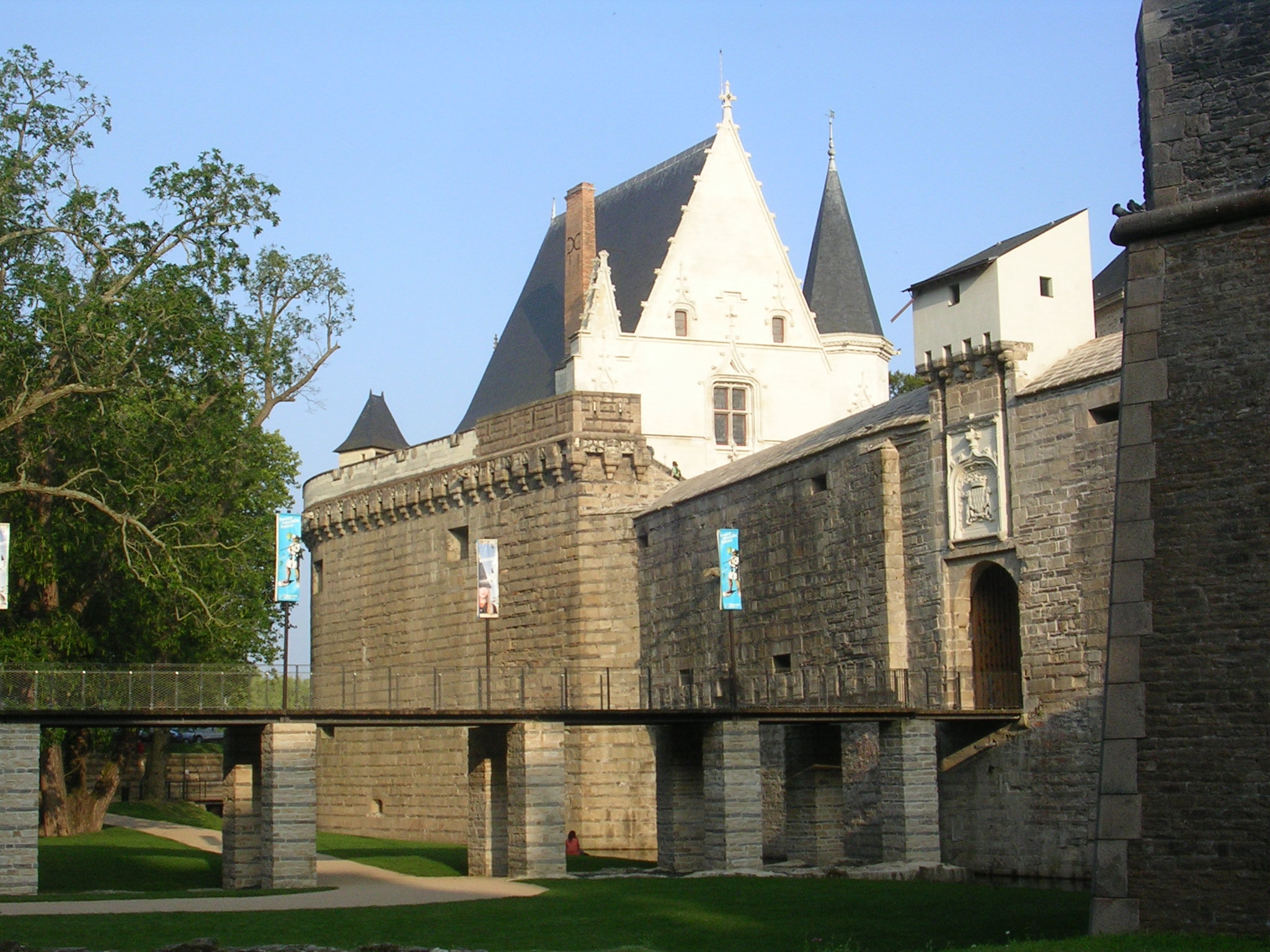 Château des ducs de Bretagne, pont de Secours (façade Nord). Nantes (France)